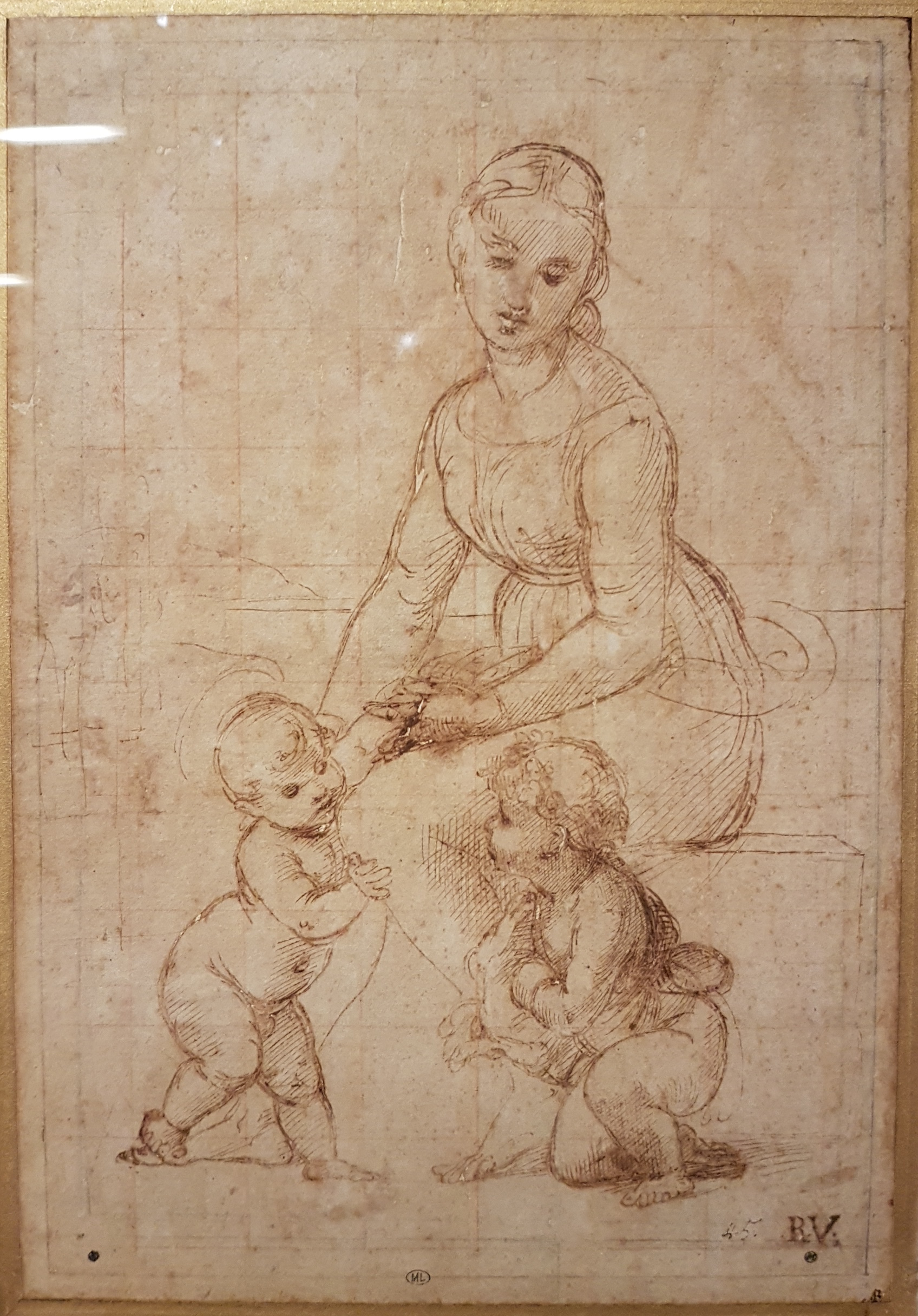 Raphaël. Vierge assise avec l'Enfant et le petit saint Jean, dans un paysage : étude pour La Belle Jardinière - Louvre, inv. 1066 Plume et encre brune, traces de stylet, mise au carreau à la sanguine et à la pierre noire. Paris, Louvre, département des Arts graphiques, inv. 1066. Photographie prise lors de l'exposition de dessins de la Collection Mariette (2019). Date : 1507 environ.